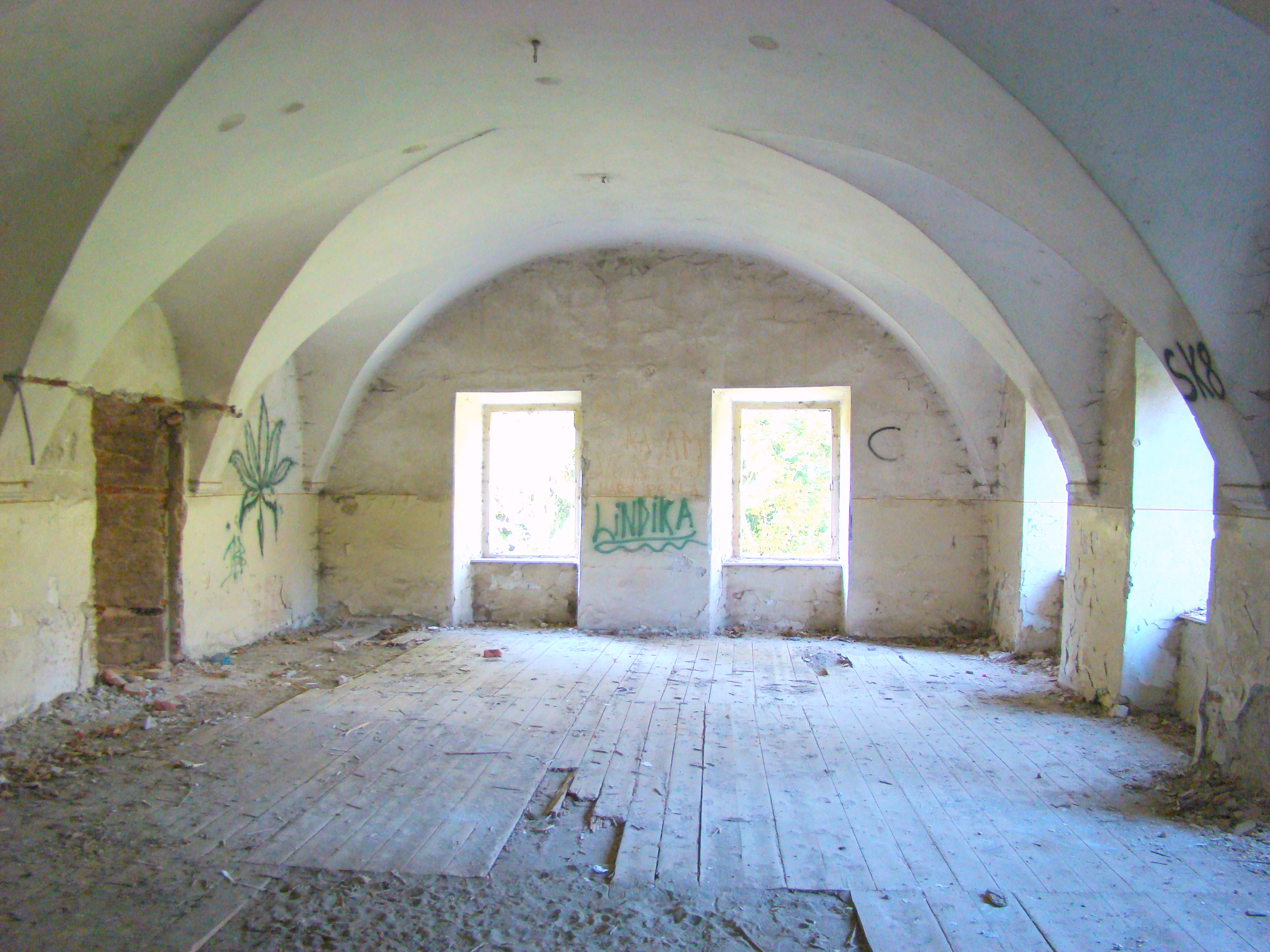 Ansamblul conacului Nalatzi-Fay, ocalitate componentă NĂLAŢVAD; oraş HAŢEG